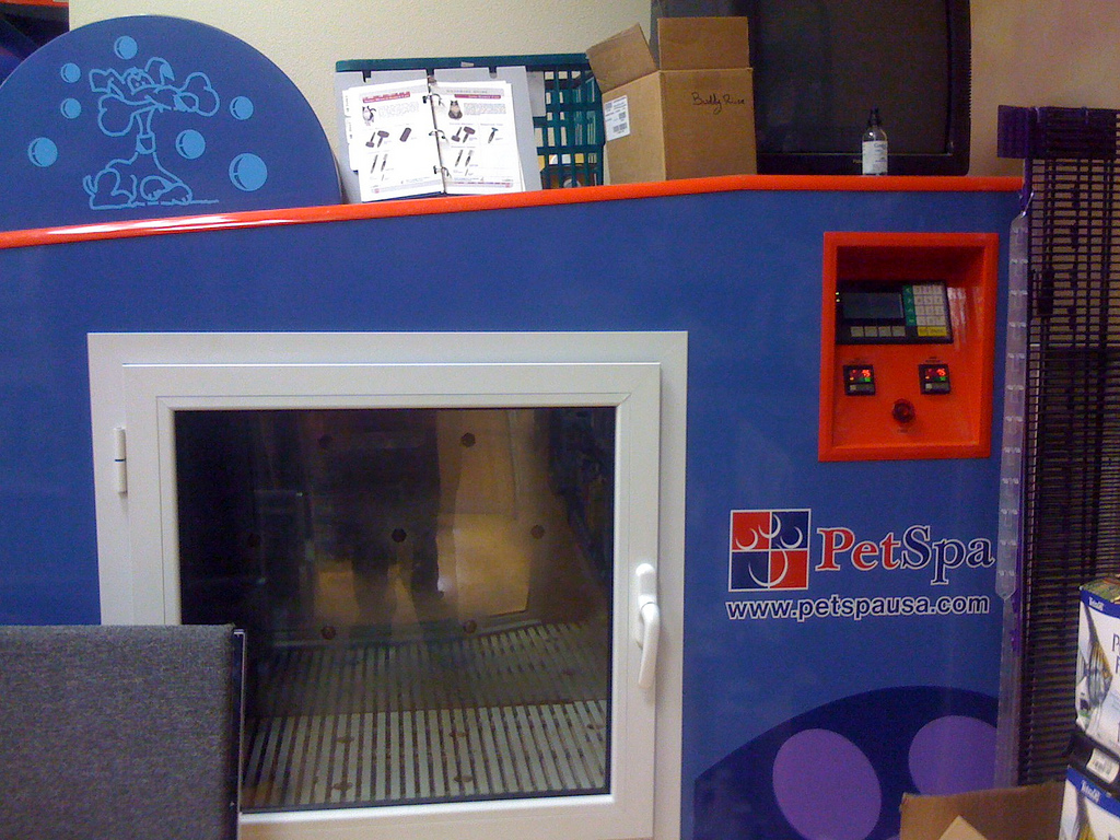 Pet washing machine (Tierwaschmaschine)